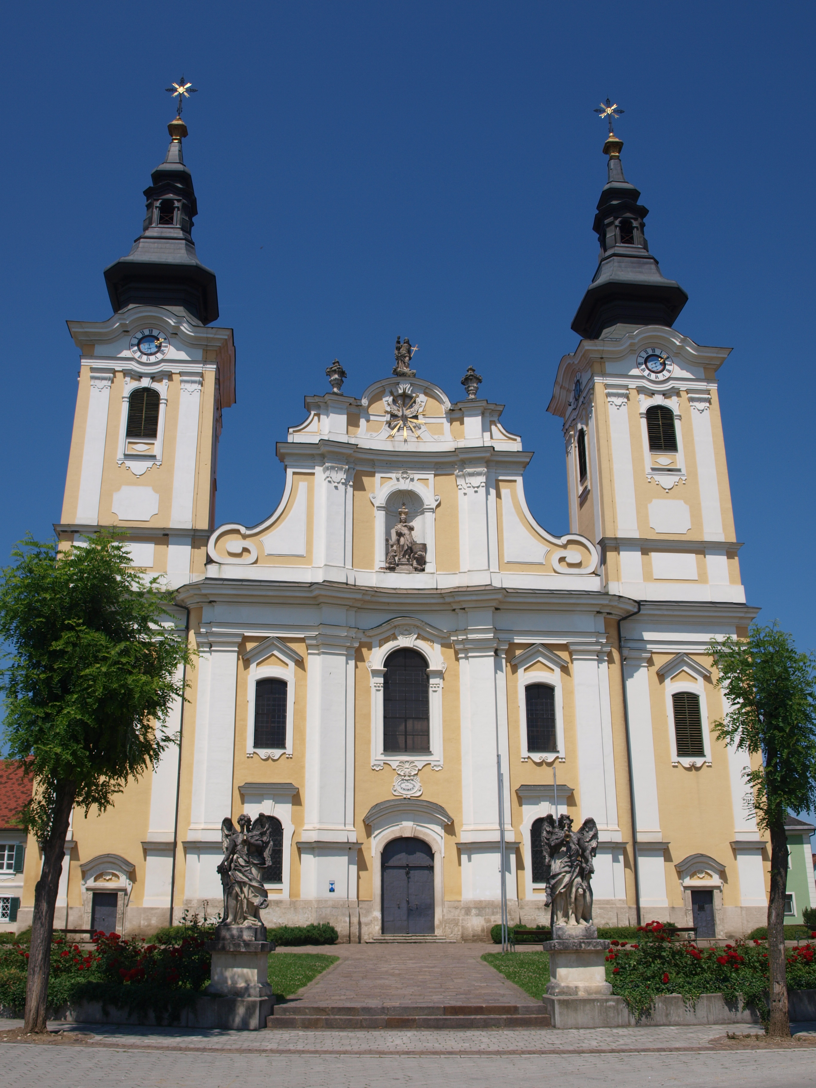 Kath. Pfarrkirche hl. Veit